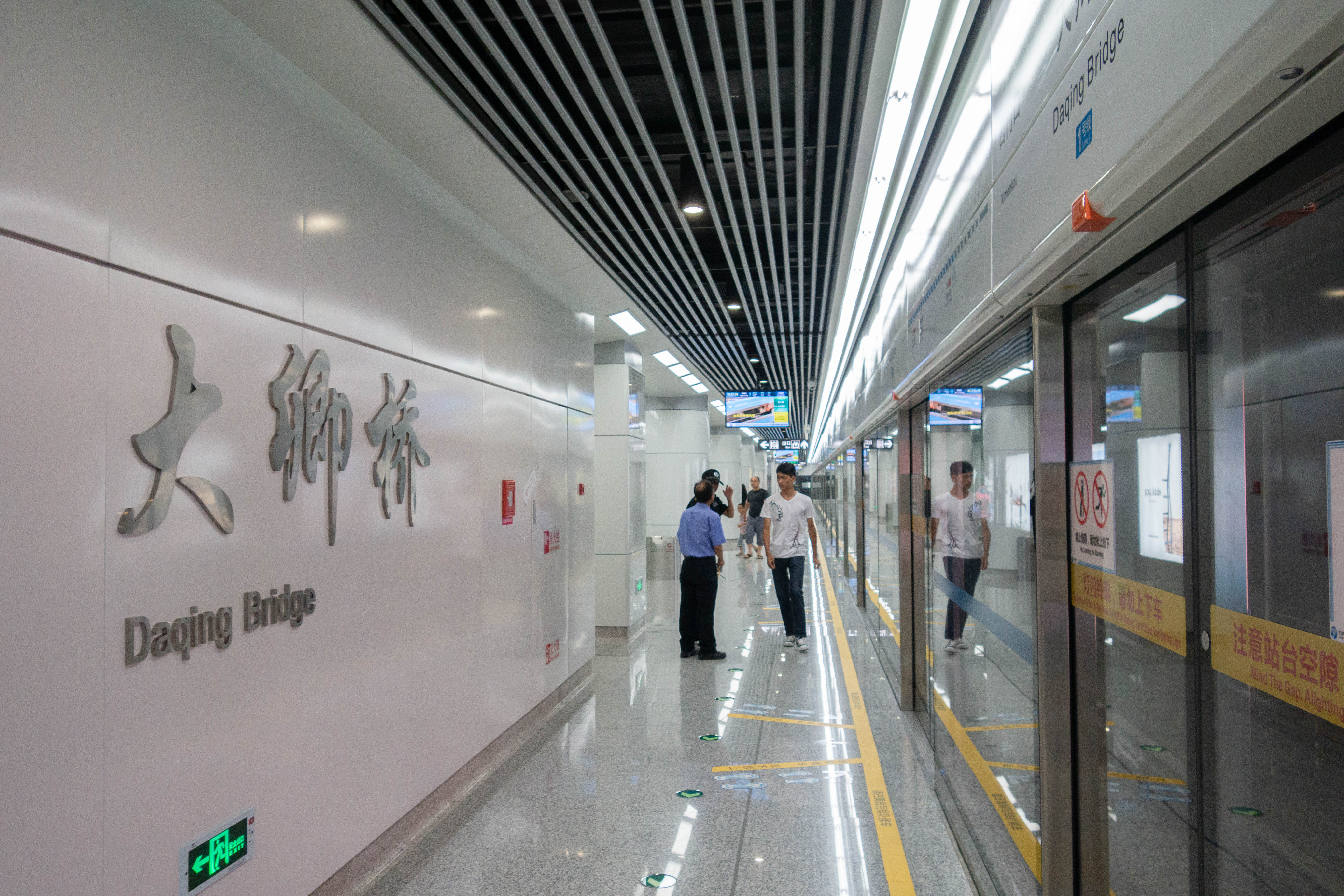 大卿桥站站台